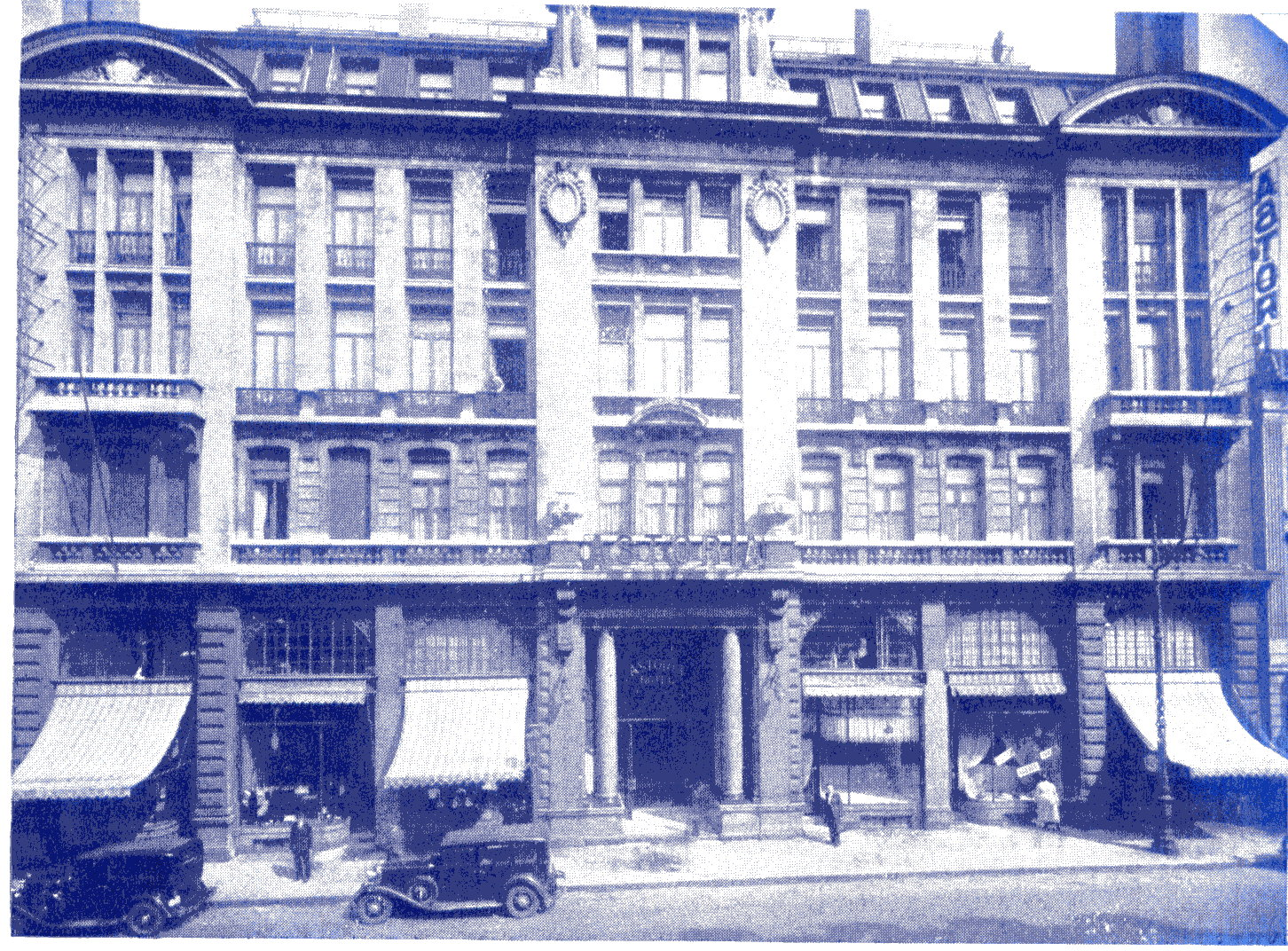 scannage personnel photo ancienne